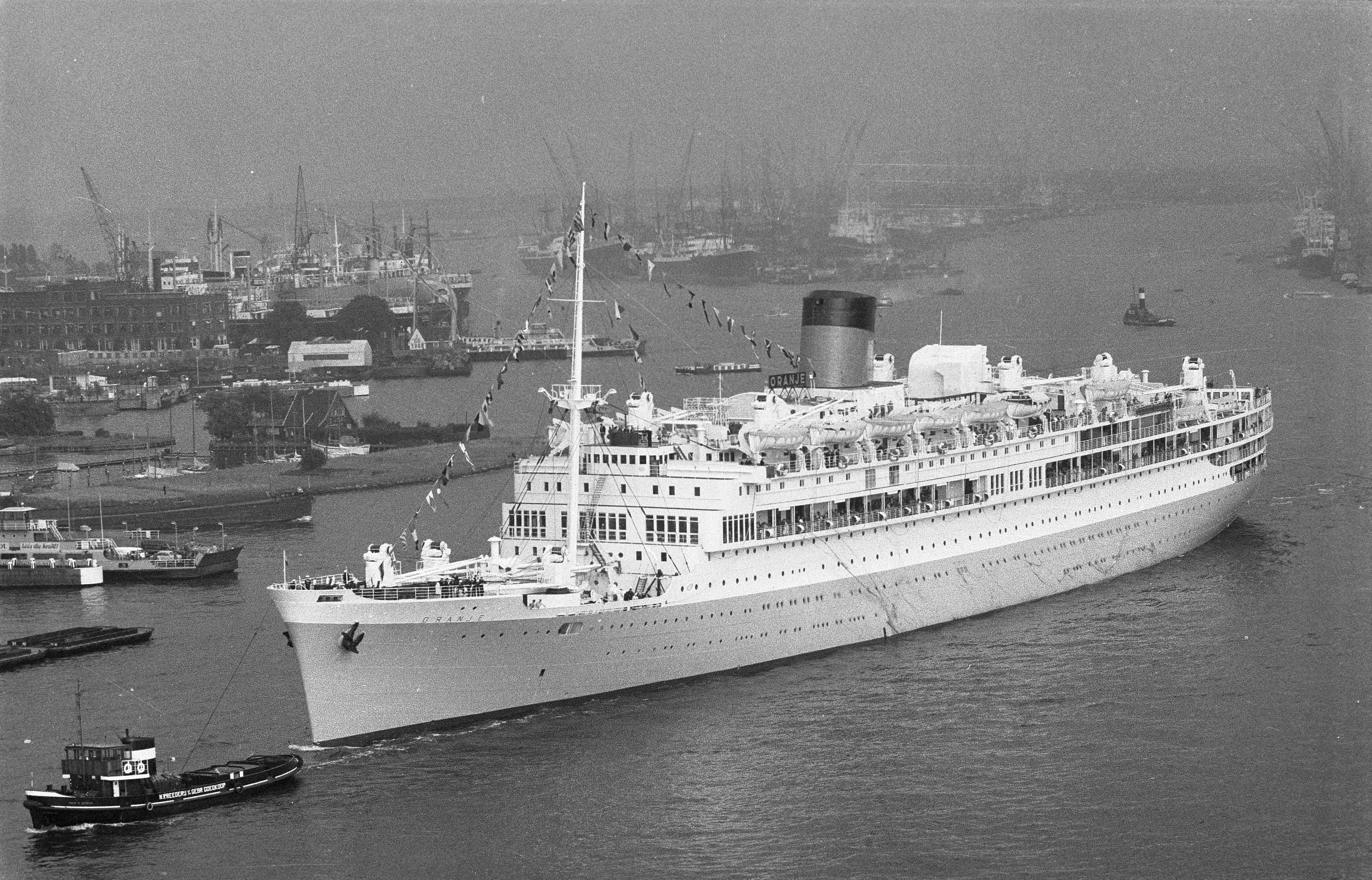 Collectie / Archief : Fotocollectie Anefo Reportage / Serie : [ onbekend ] Beschrijving : Ms. Oranje vertrekt voor 2 cruises Datum : 21 juli 1960 Trefwoorden : cruises Instellingsnaam : MS Oranje Fotograaf : Pot, Harry / Anefo Auteursrechthebbende : Nationaal Archief Materiaalsoort : Negatief (zwart/wit) Nummer archiefinventaris : bekijk toegang 2.24.01.05 Bestanddeelnummer : 911-4446